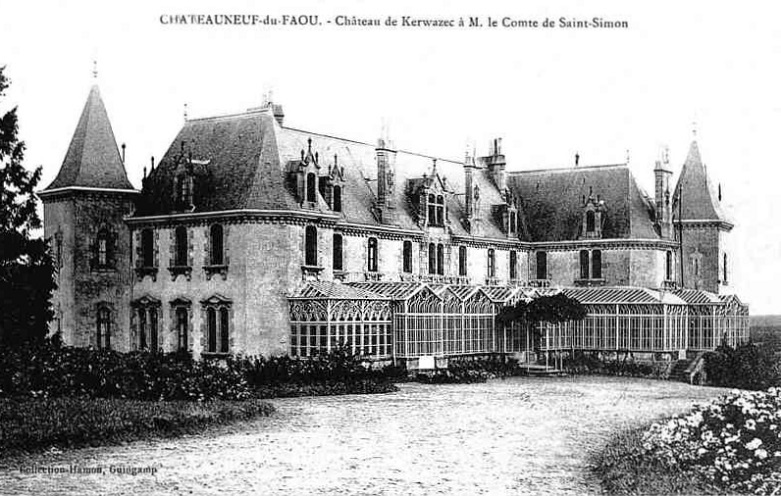 Le château de Kervoazec (Kerwazec) vers 1900 et son jardin d'hiver